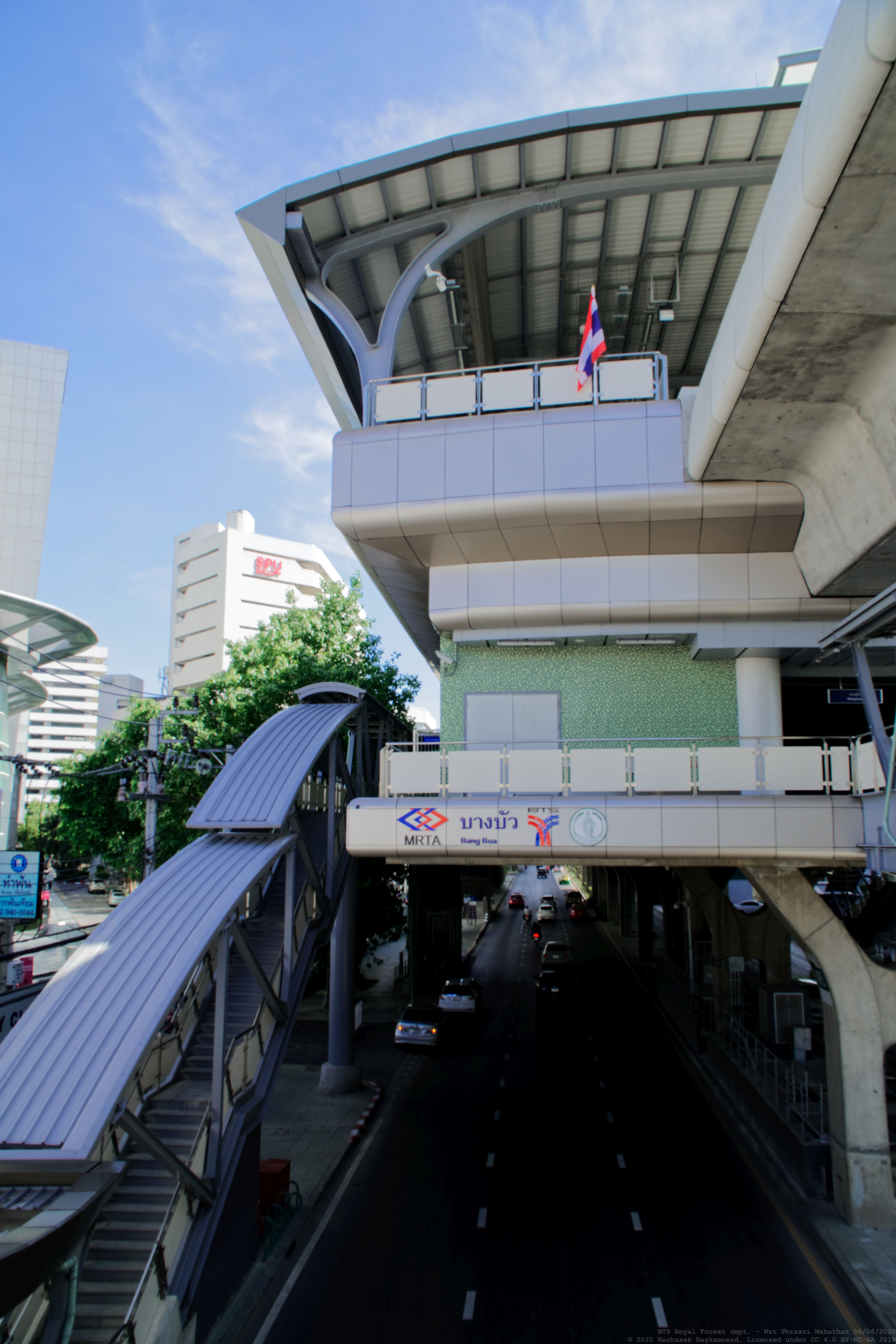 สถานีบางบัว มองจากฝั่งออกเมืองไปทางมหาวิทยาลัยศรีปทุม